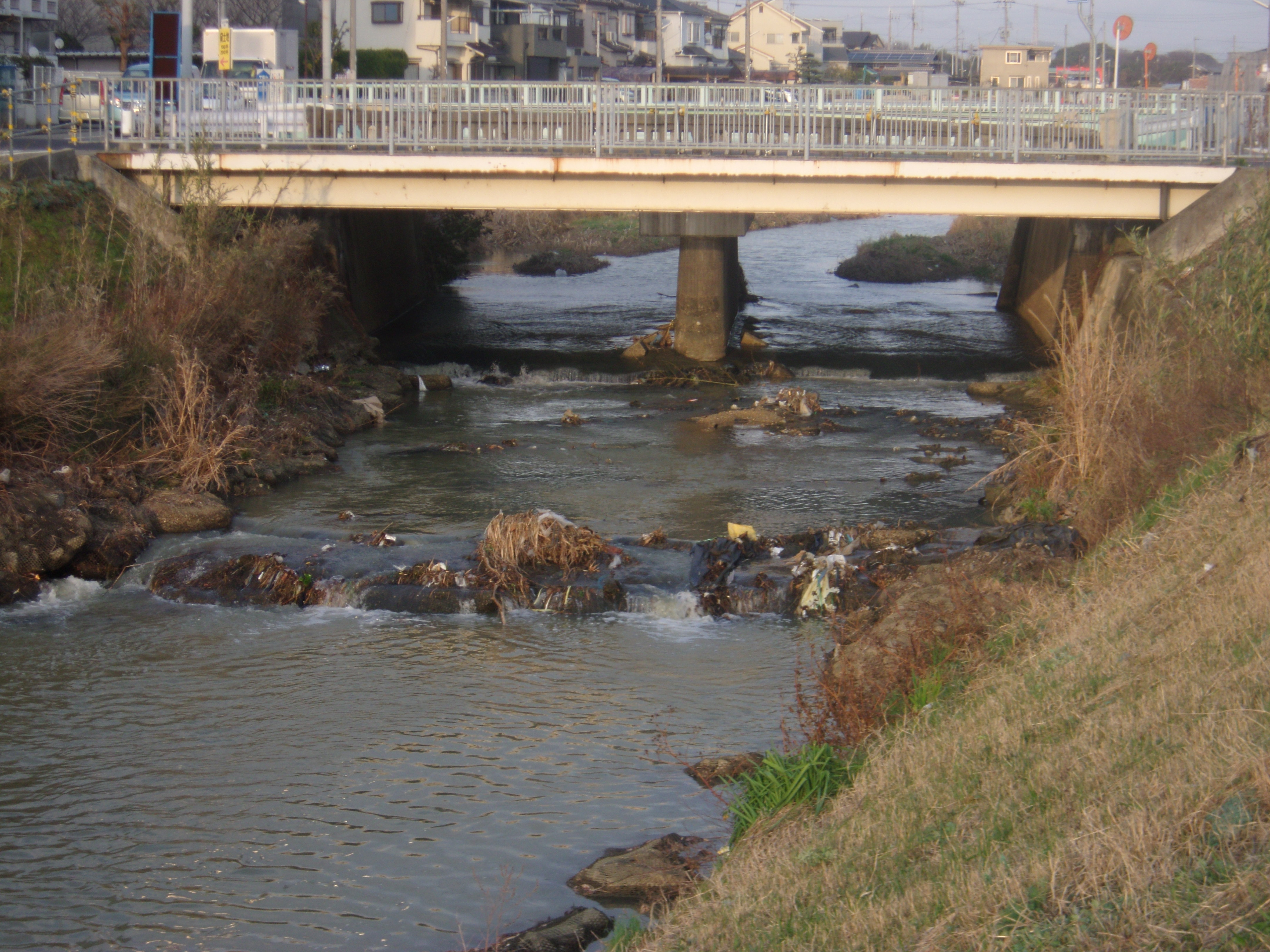 明石市を流れる二級河川の瀬戸川。国道2号線に架かる幣塚橋を望む。